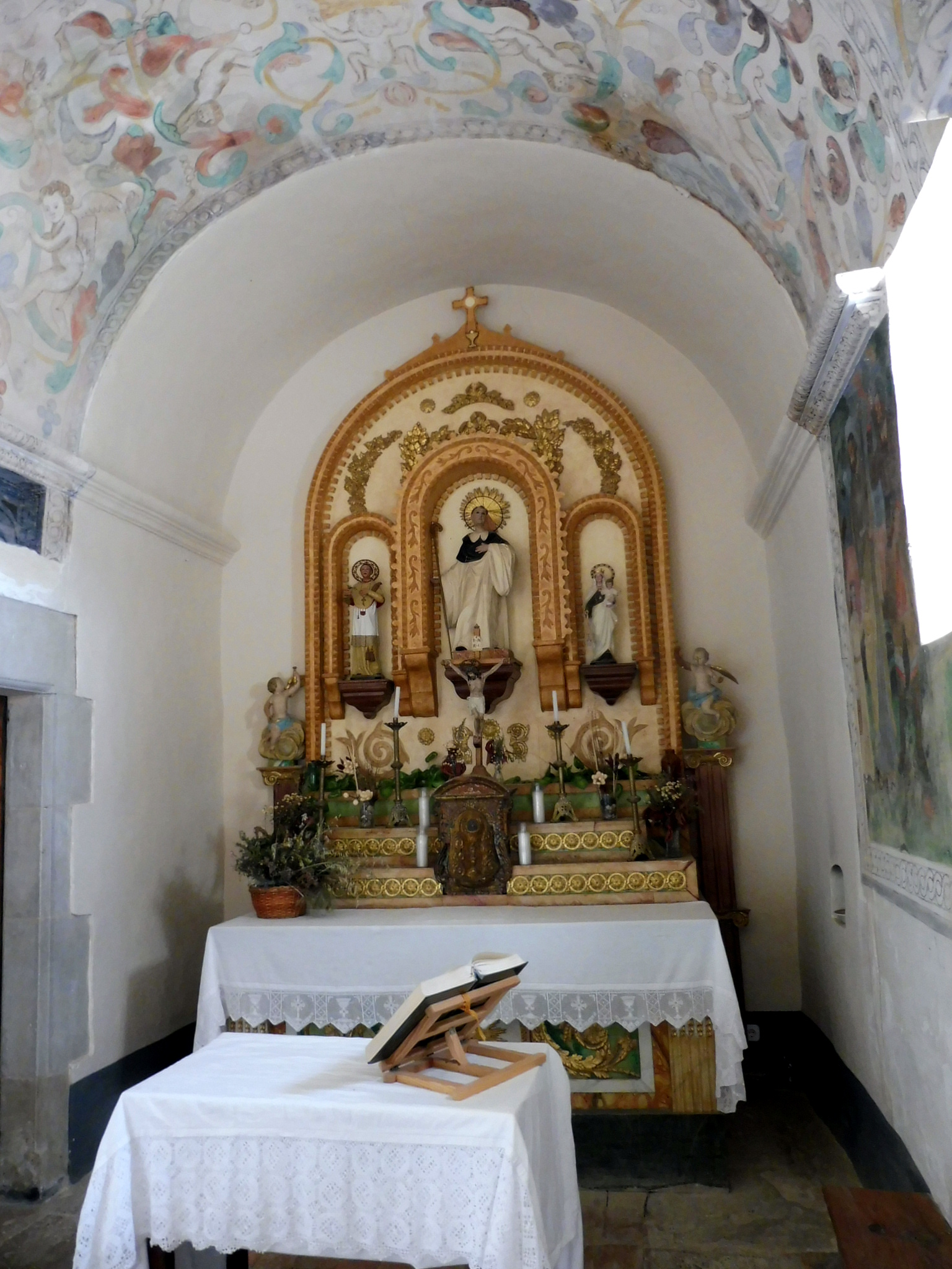 Església de Sant Grau d'Anglerill (Navès): interior, presbiteri